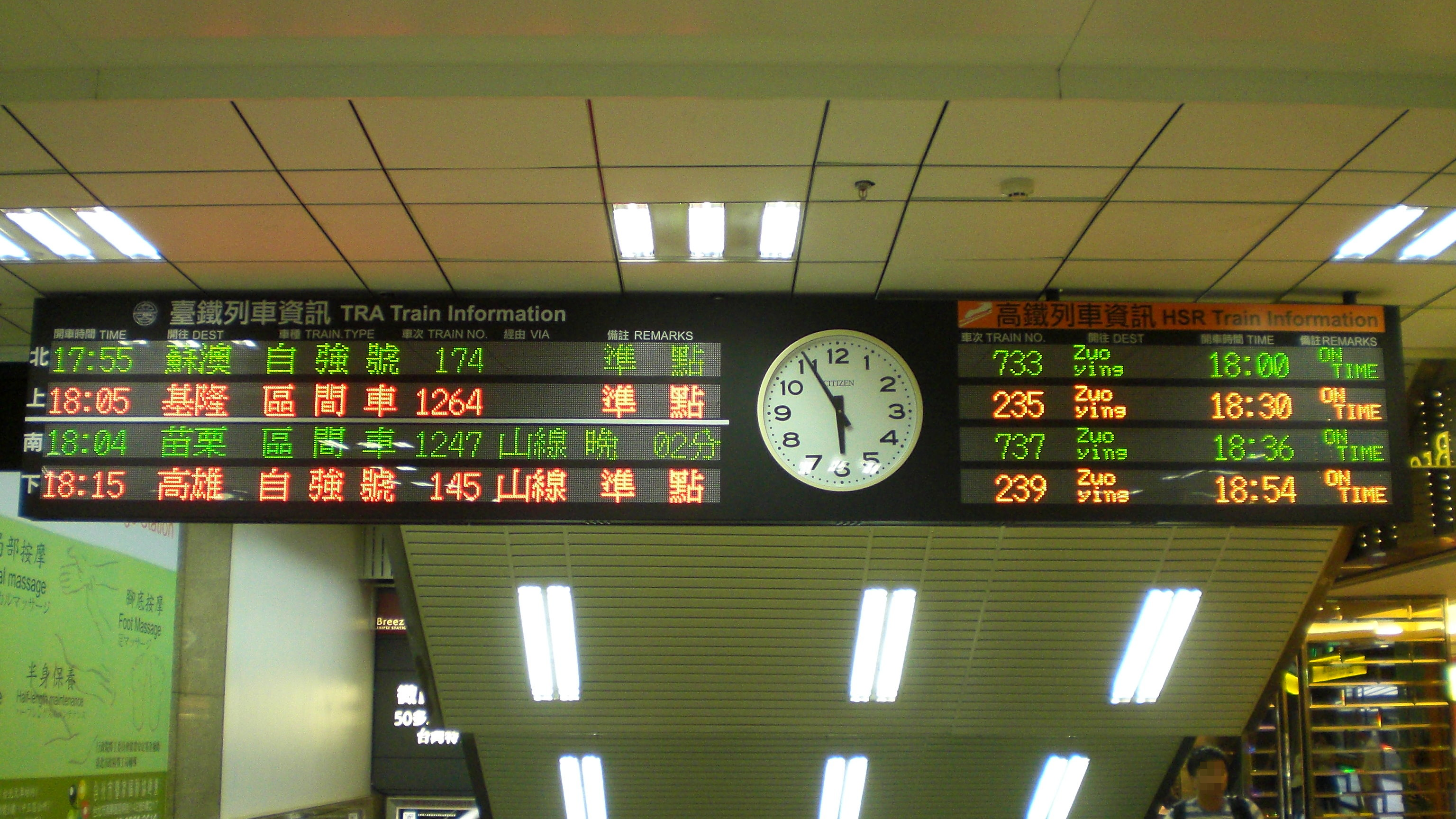 中文（台灣）: 臺北車站1樓23號階梯上方的LED列車資訊顯示器，左邊顯示臺鐵列車資訊，右邊顯示高鐵列車資訊。